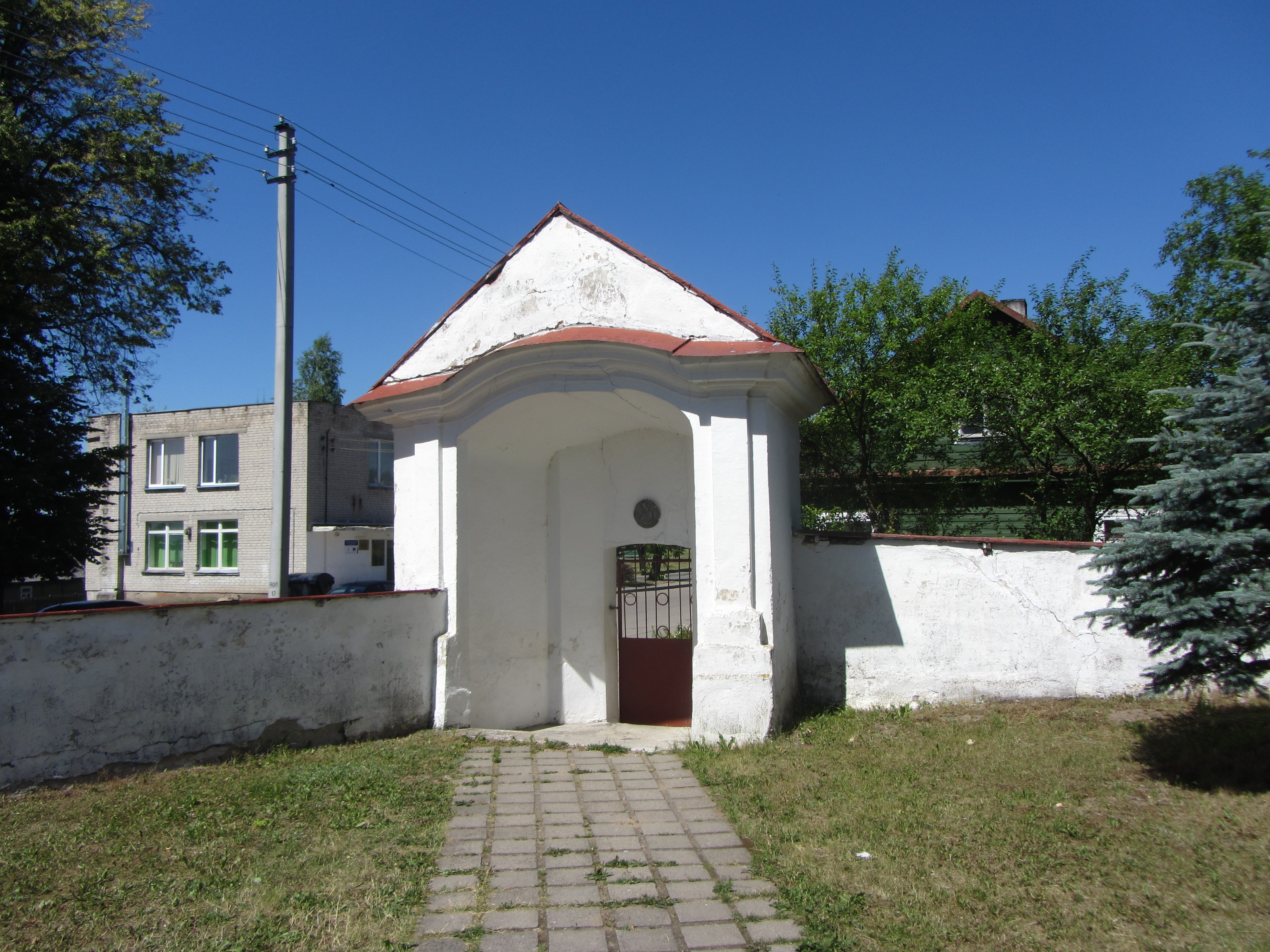 Stakliškės, Lithuania